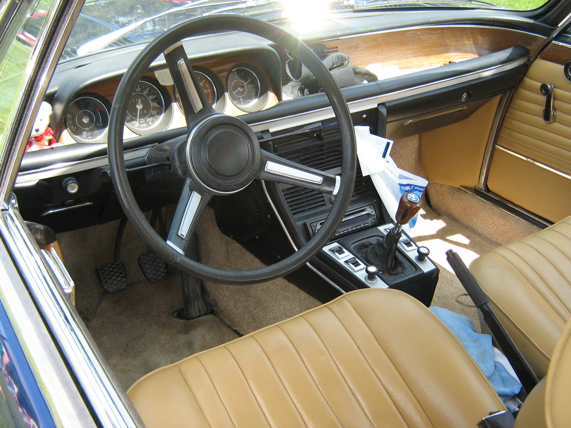 BMW 2800 CS